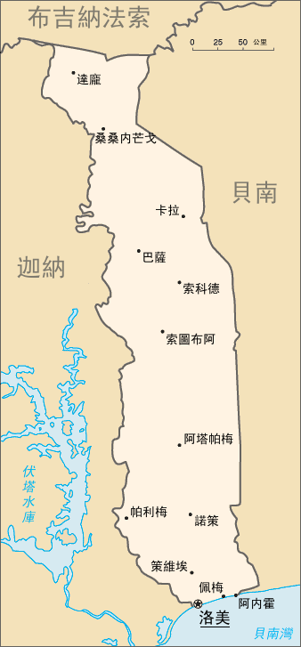 多哥地圖。